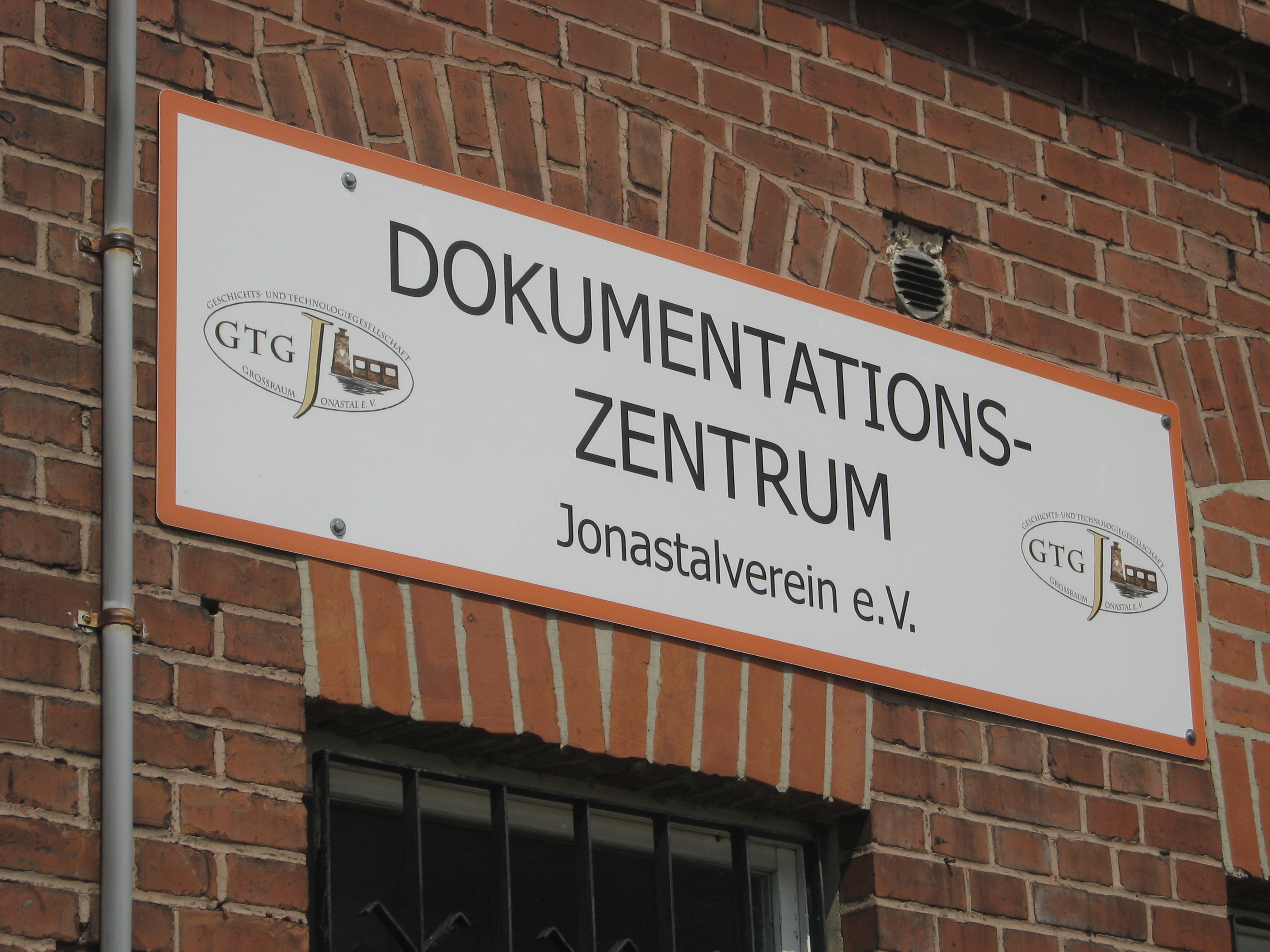 Schild des beim Dokumentationszentrum des Jonastalvereins in Arnstadt.